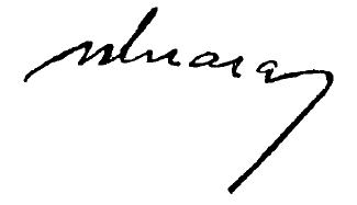 Semnătura lui Emil Bodnăraş, ministrul apărării naţionale Sursa - Lucrarea "1848 în Principatele Române", Ministerul Artelor şi Informaţiilor, Bucureşti, 1948 Restricţii - fără restricţii,este o lucrare oficială a administraţiei de stat